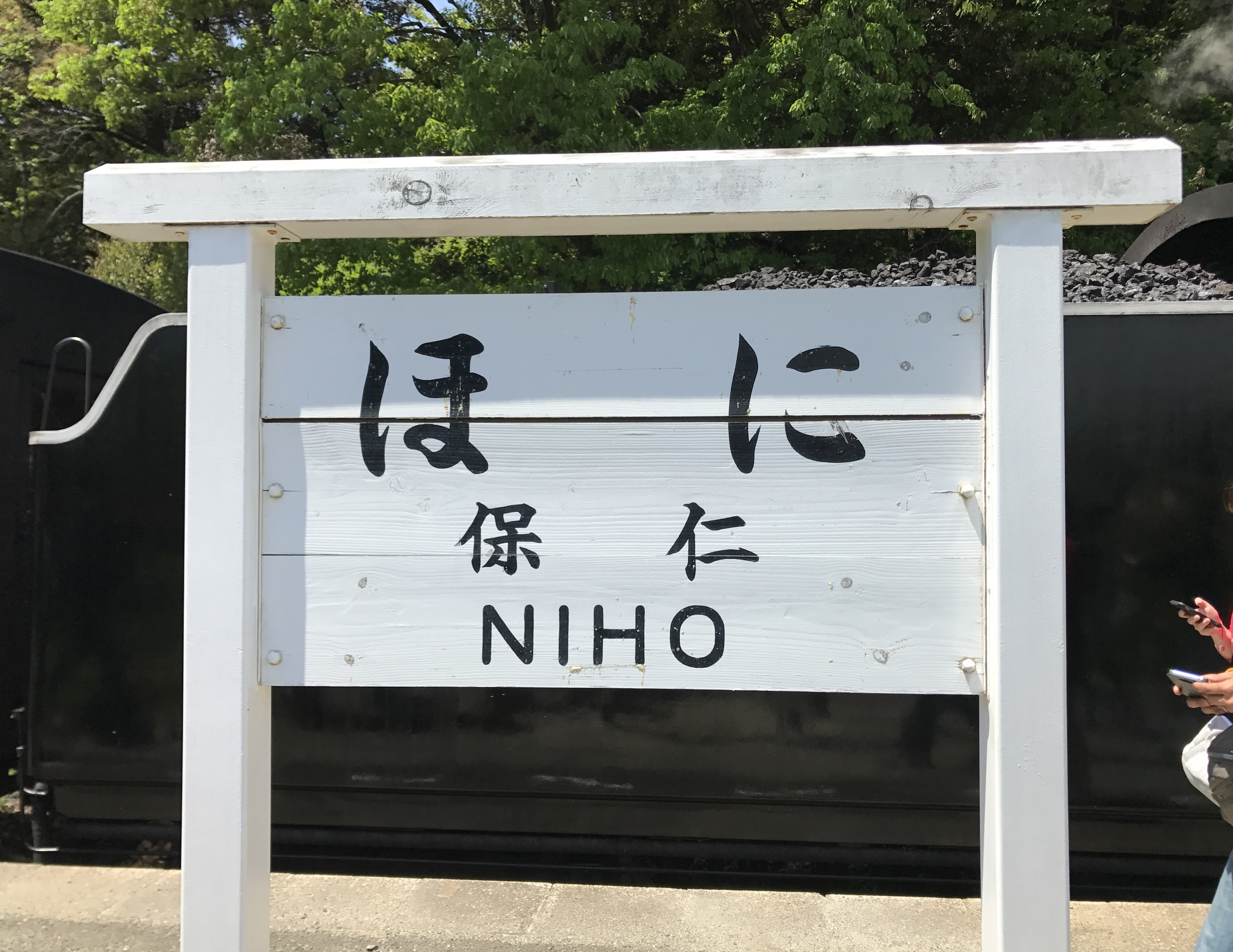 仁保駅の観光用駅名標